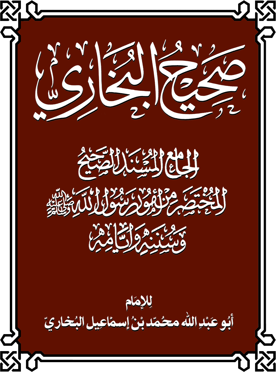 تصنيف:كتب الحديث تصنيف:كتب أهل السنة والجماعة تصنيف:أغلفة كتب